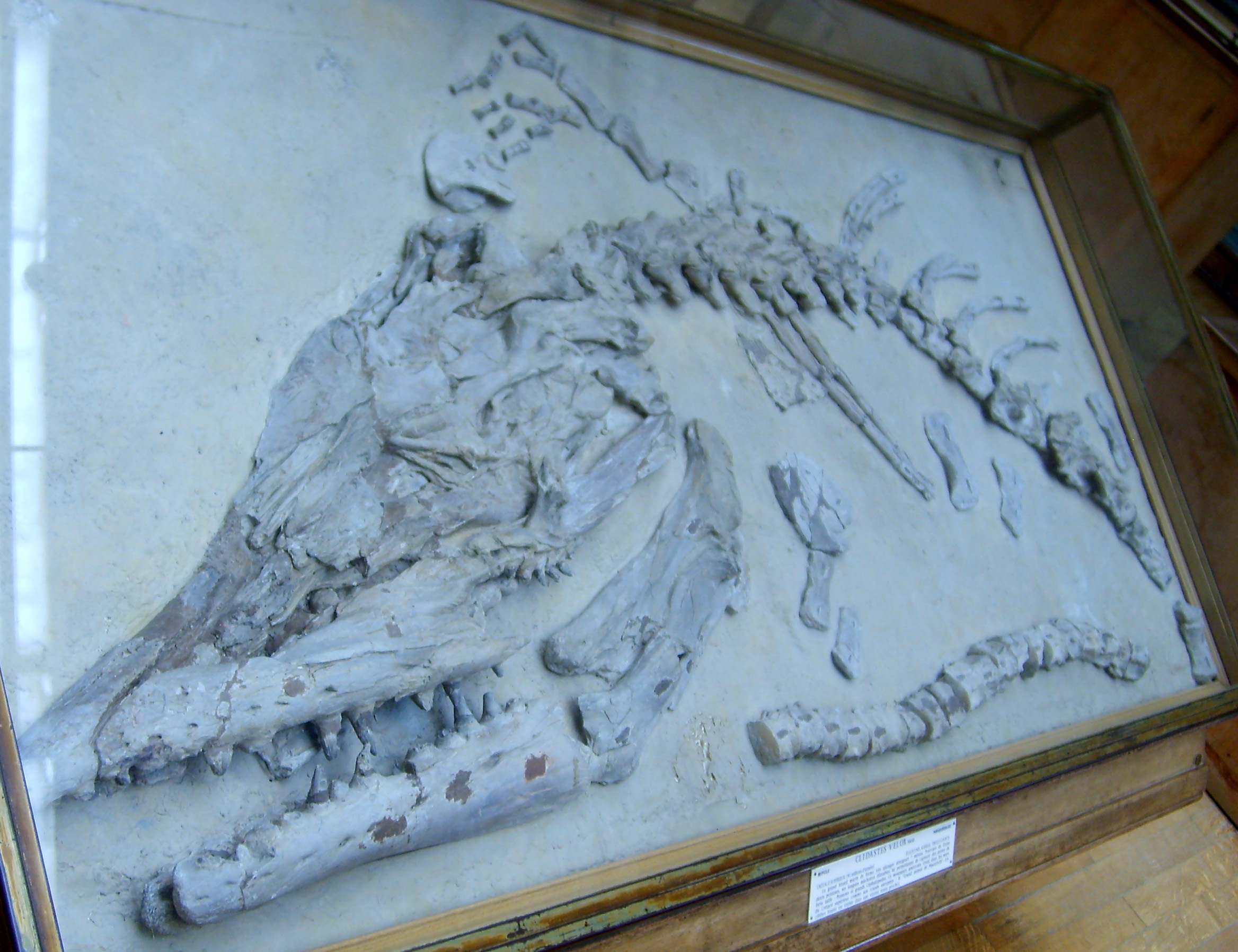 Tylosaurus fossil (formerly Clidastes velox), Muséum national d'histoire naturelle, Paris.